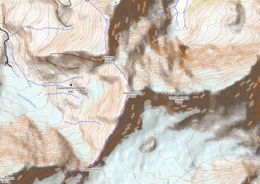 carte réalisée sur umap This map may be incomplete, and may contain errors. Don't rely solely on it for navigation.